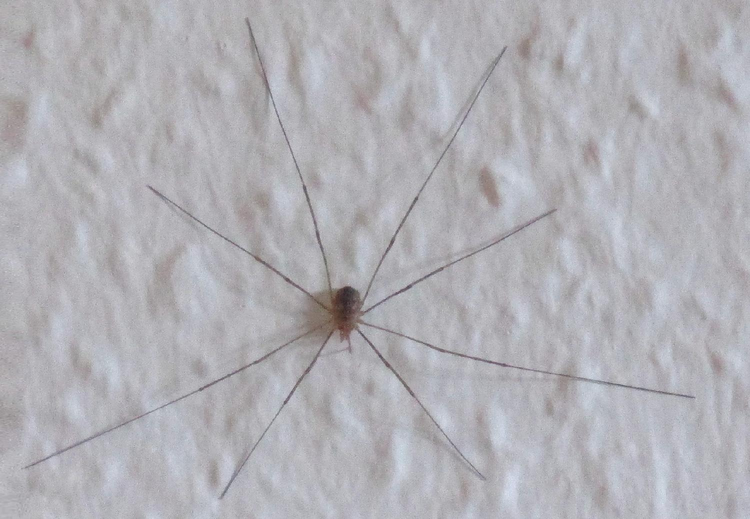 Weberknecht